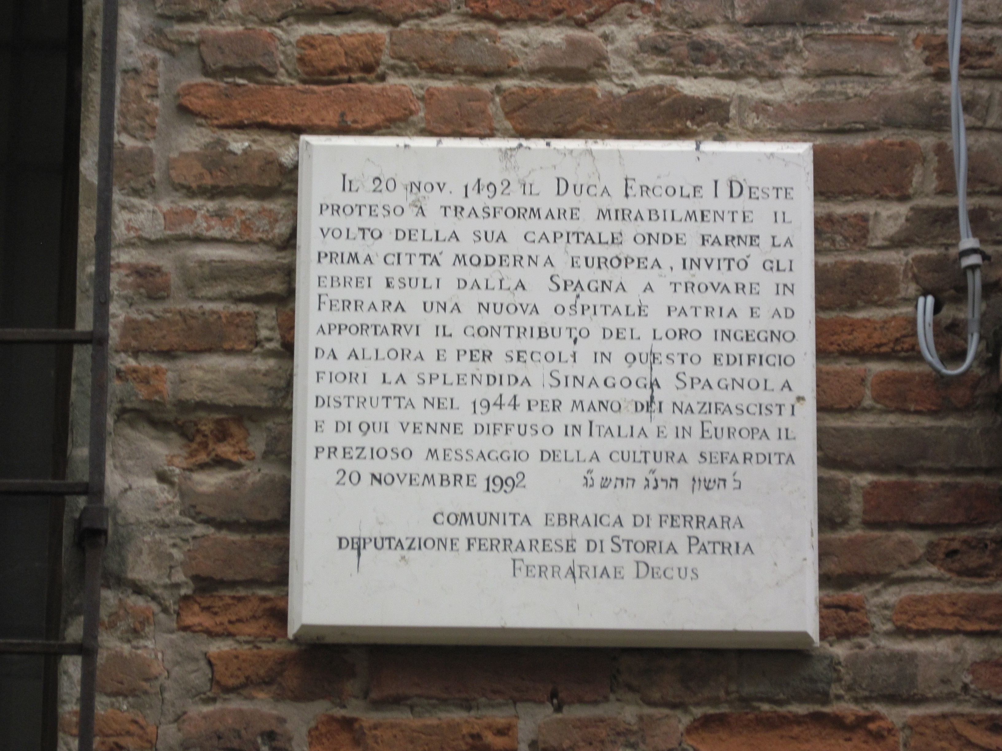 Ferrara, Via Vittoria 41, Scola spagnola, lapide in ricordo dell'accoglienza agli ebrei sefarditi da parte del Duca Ercole I d'Este